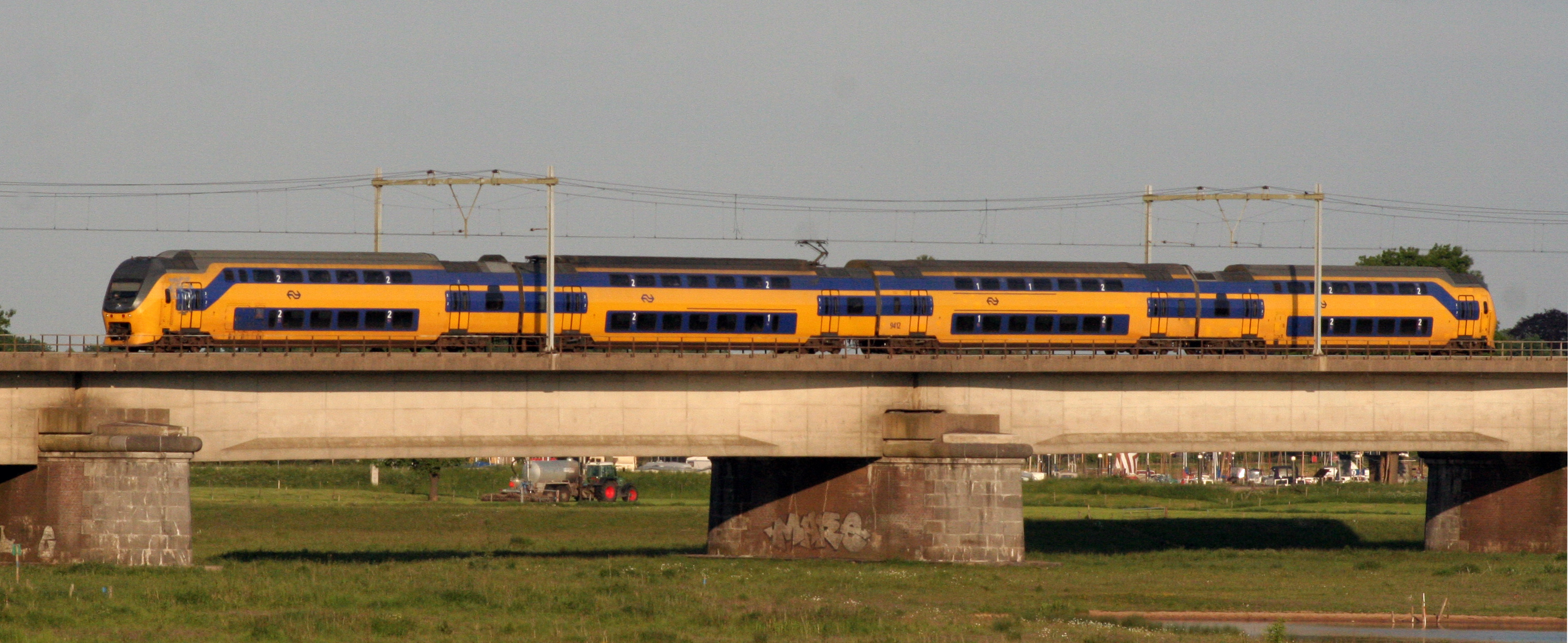 VIRM op de brug te Culemborg